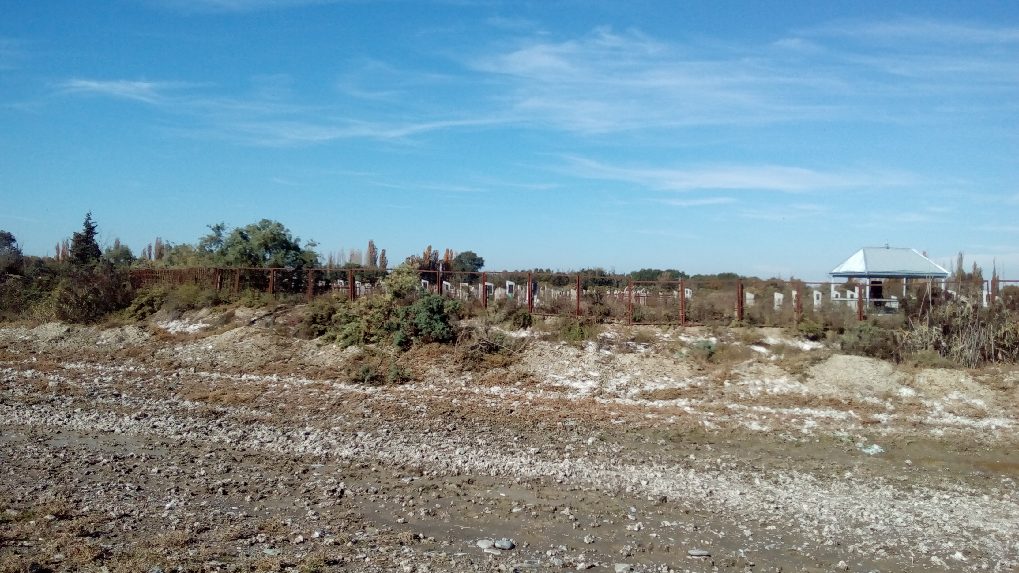 Zərdab, Yarməmmədbağı